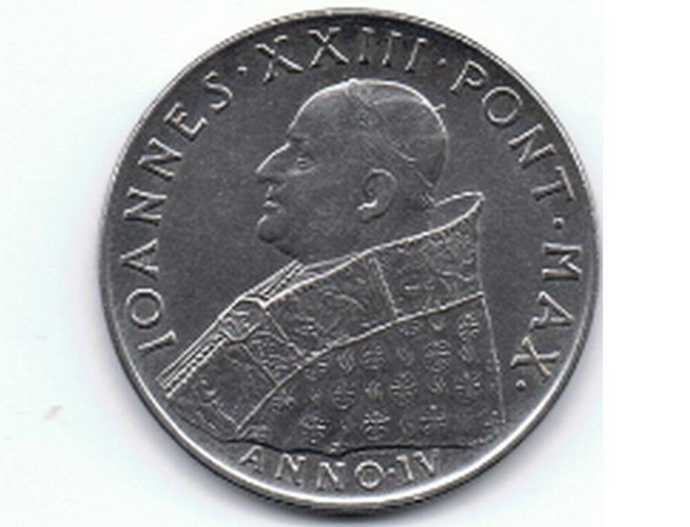 100 Lire - Citta del Vaticano - Giovanni XXIII